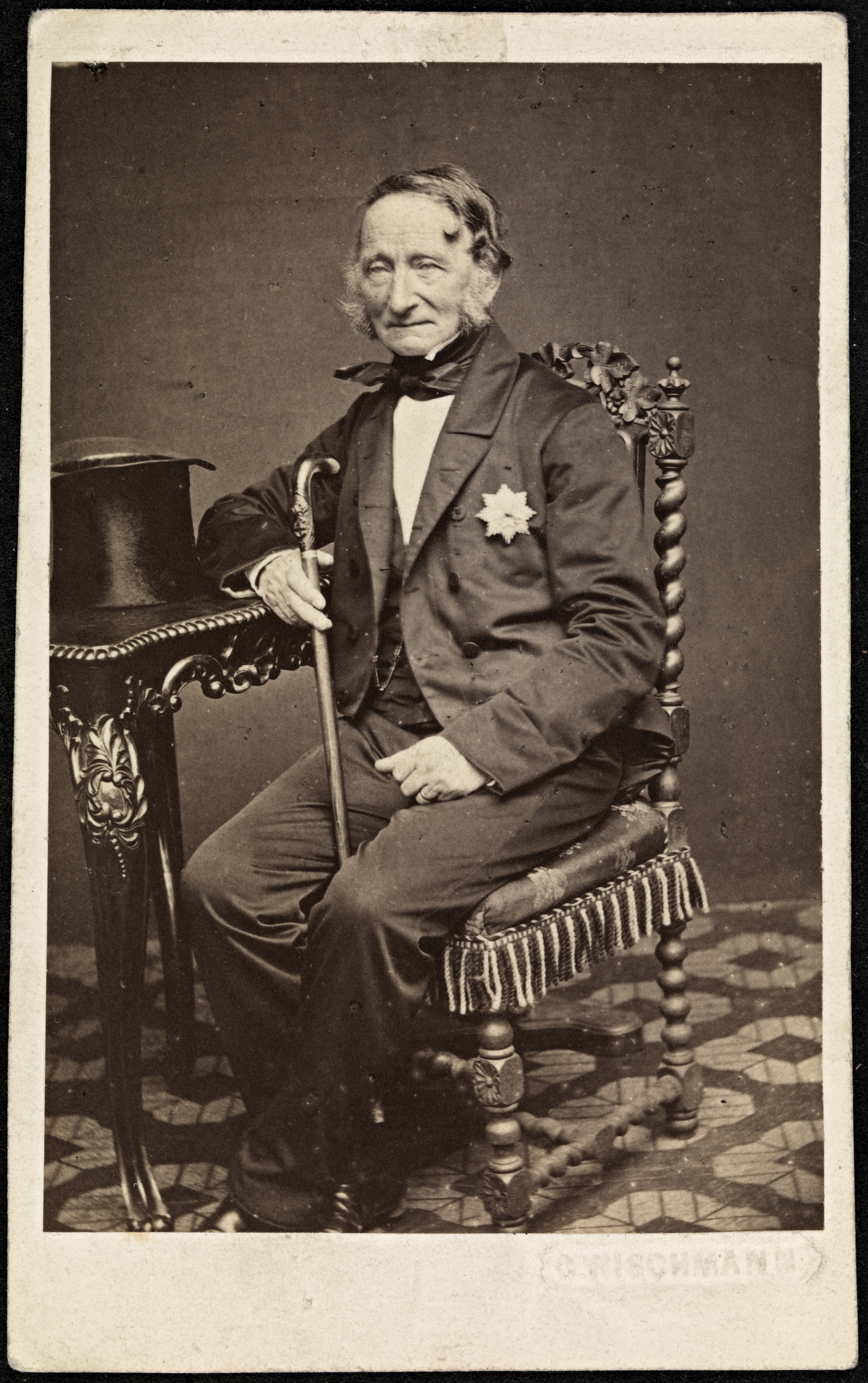 Tittel / Title: Portrett av Christopher Hansteen (1784-1873) Motiv / Motif: Visittkort. Hansteen var astronom og geofysiker. Bildesignatur / Image Number: blds_03774